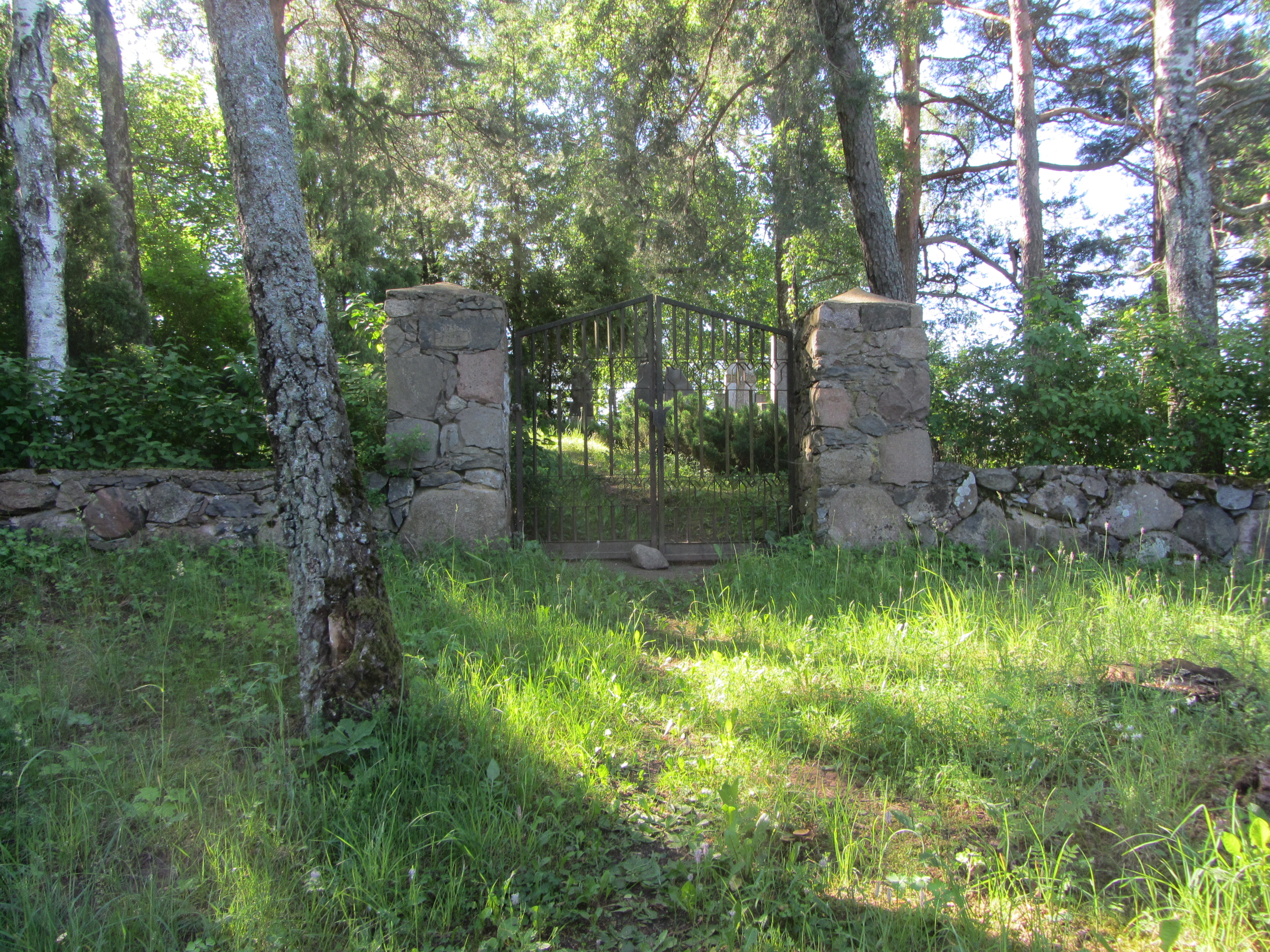 Sadūnai, Lithuania